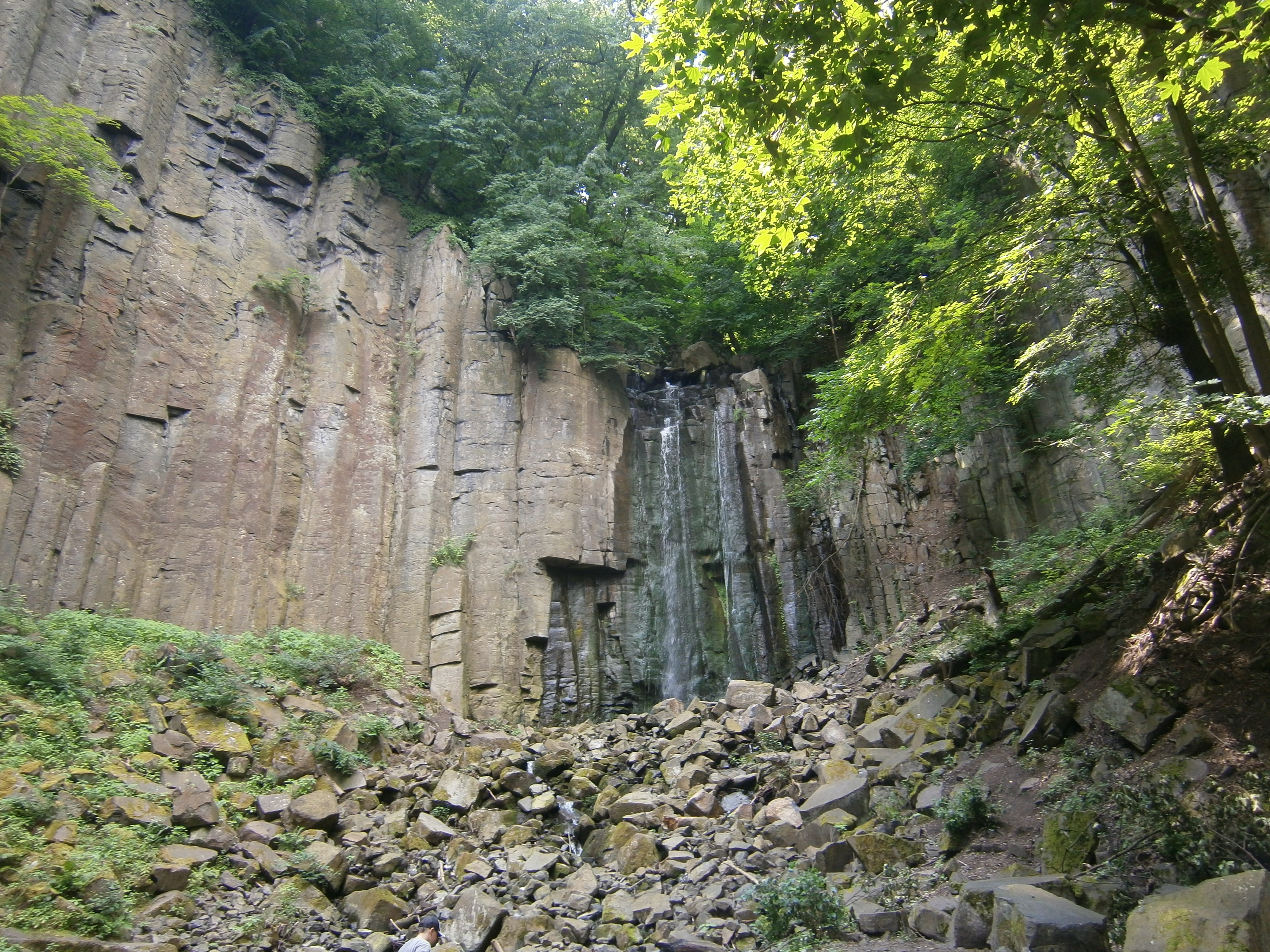 Vaňovský vodopád, nedaleko NPP Vrkoč